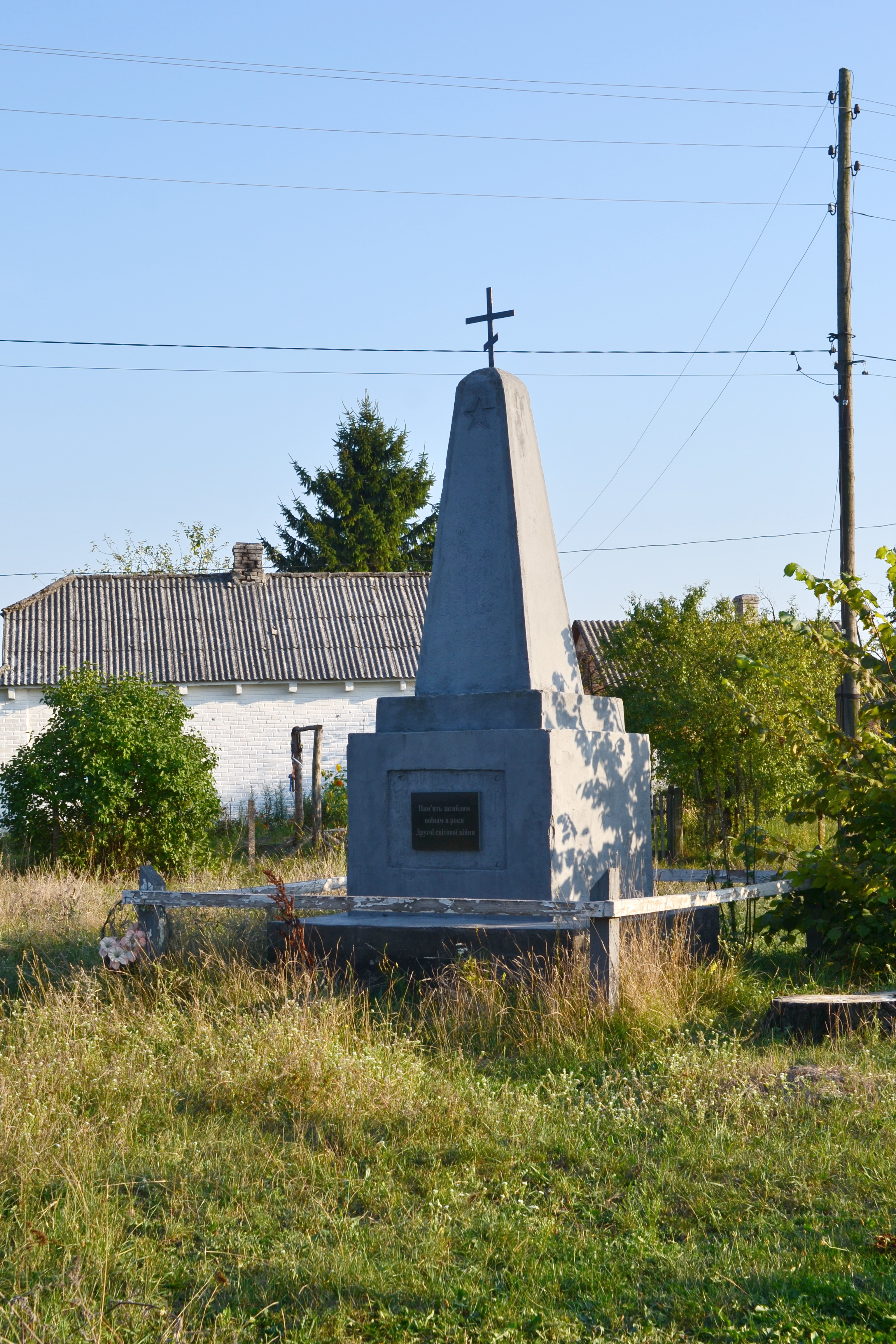 Пам'ятник землякам (1975 рік) - Машів Любомльський район Волинська область Україна